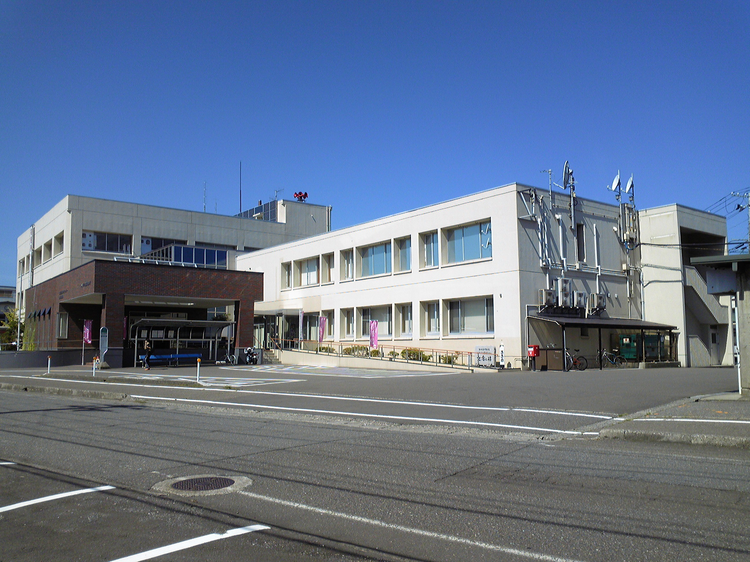 糸魚川市役所能生事務所。新潟県糸魚川市大字能生1941-2。